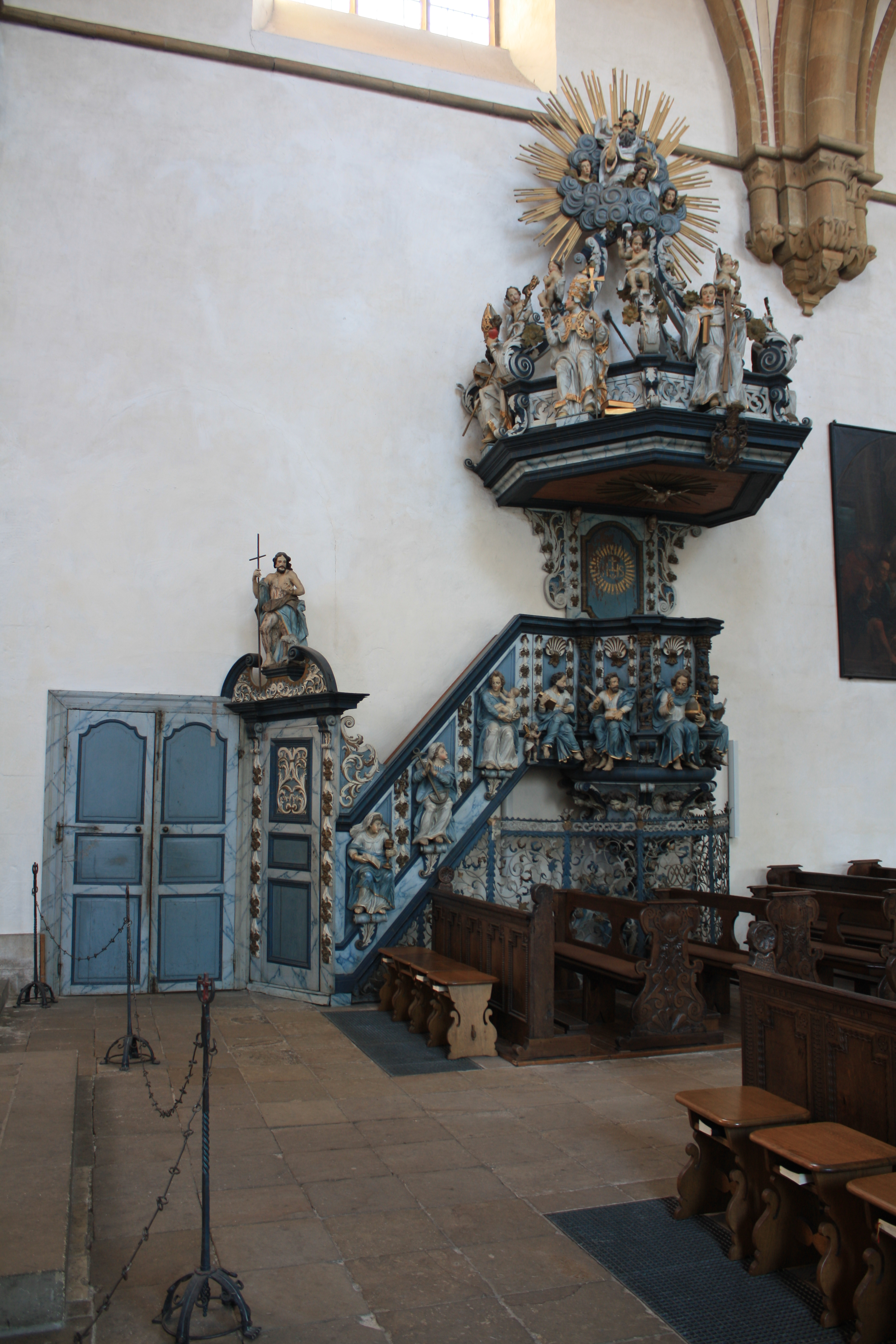 Kanzel im ehemaligen Kloster Marienfeld